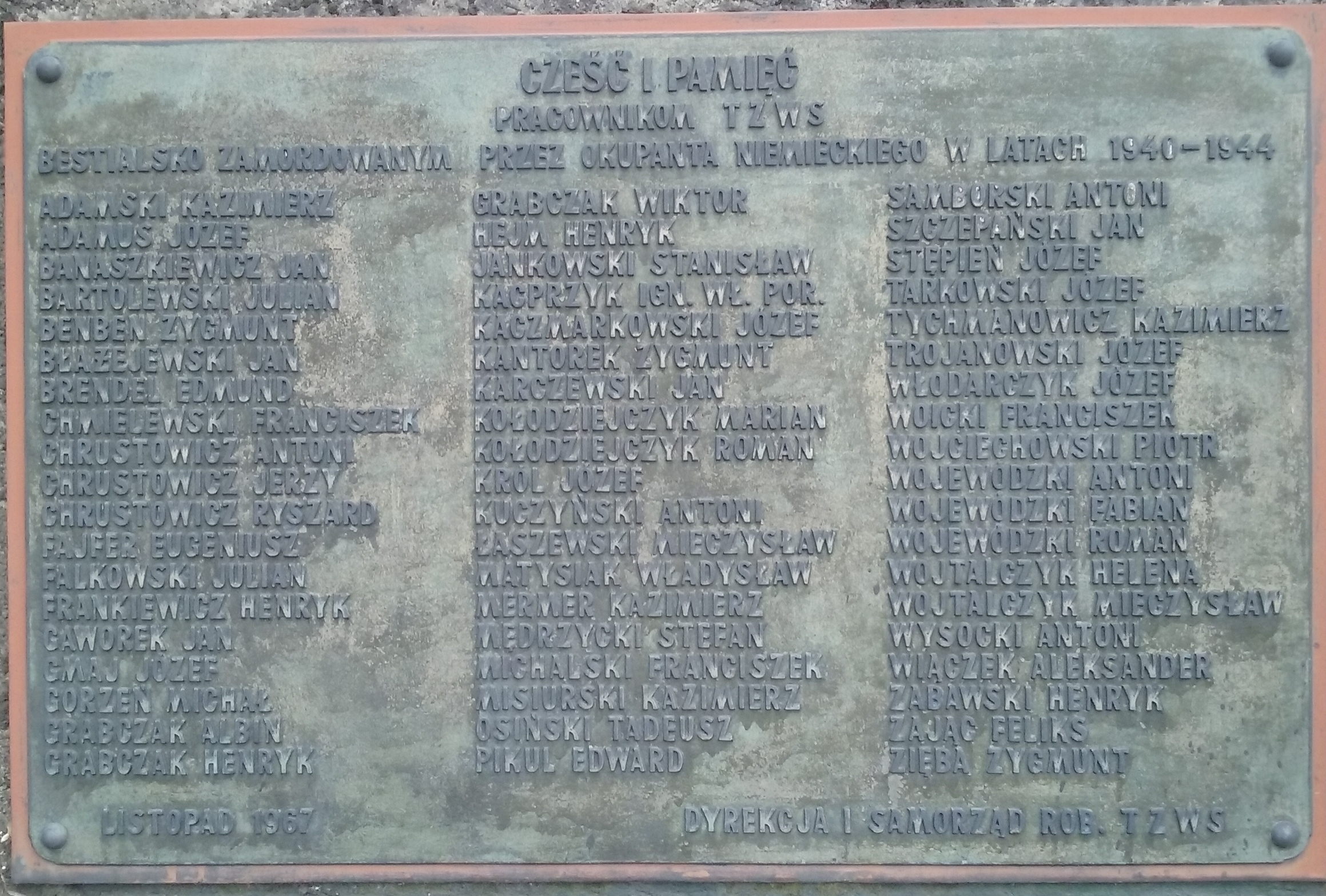 Tomaszów Mazowiecki w województwie łódzkim, PL,EU. Spalska 110. Tablica upamiętniająca część ofiar mordów dokonywanych przez Niemców wśród pracowników TFSJ (w PRL jako Tomaszowska Fabryka Włókien Sztucznych, później Wistom) CC0